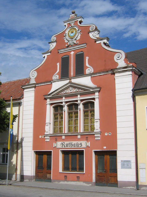 Rathaus Groß-Enzersdorf: Lizenz: GNU FDL Quelle: Datum: de:2004 Ort: Groß-Enzersdorf, Niederösterreich